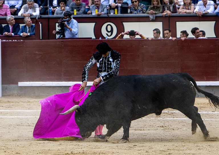 El torero Forges, en Las Ventas, traza una media verónica a pies juntos.